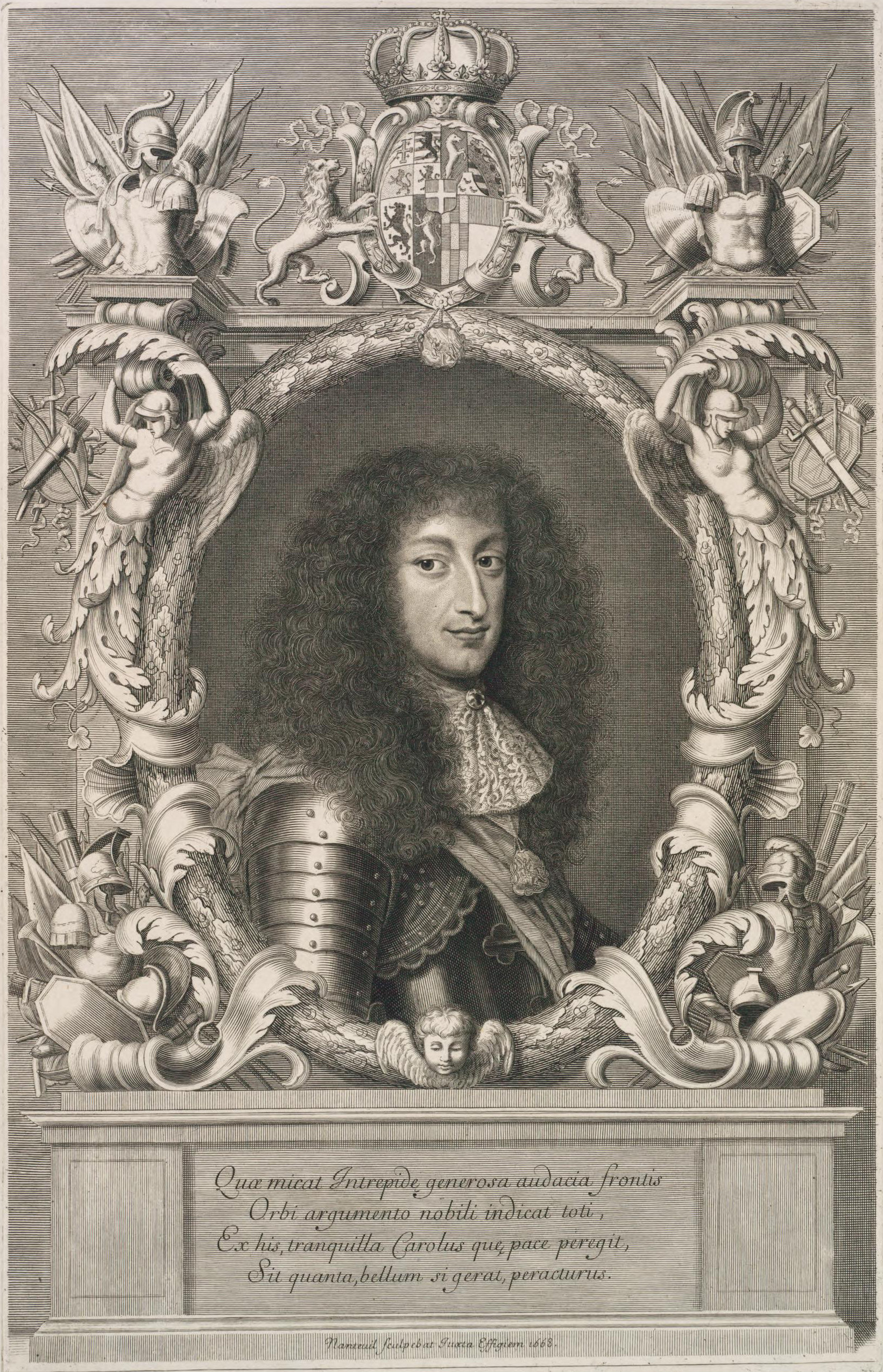 Stich mit dem Porträt Herzog Karl Emanuels II. von Savoyen